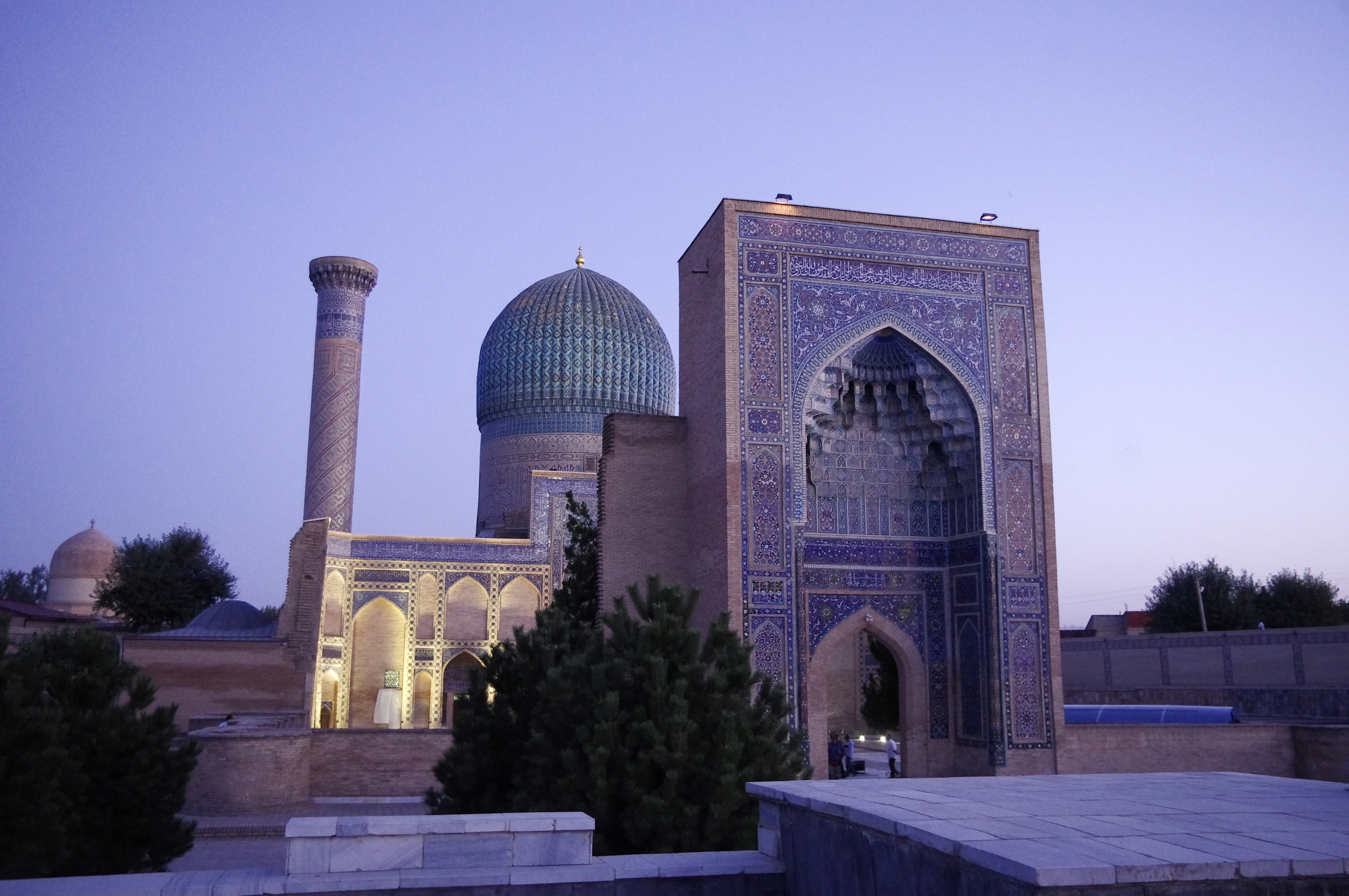 The making of this document was supported by Wikimedia Polska. To zdjęcie zostało wykonane podczas Wikiwyprawy 2015.Wszystkie zdjęcia z wyprawy możesz zobaczyć w kategorii: Wikiwyprawa 2015. English | polski | +/− To zdjęcie zostało załadowane dzięki współpracy z firmą Hyperbook. polski | +/− To zdjęcie zostało załadowane dzięki współpracy z firmą: Kopex Group. English | polski | +/−